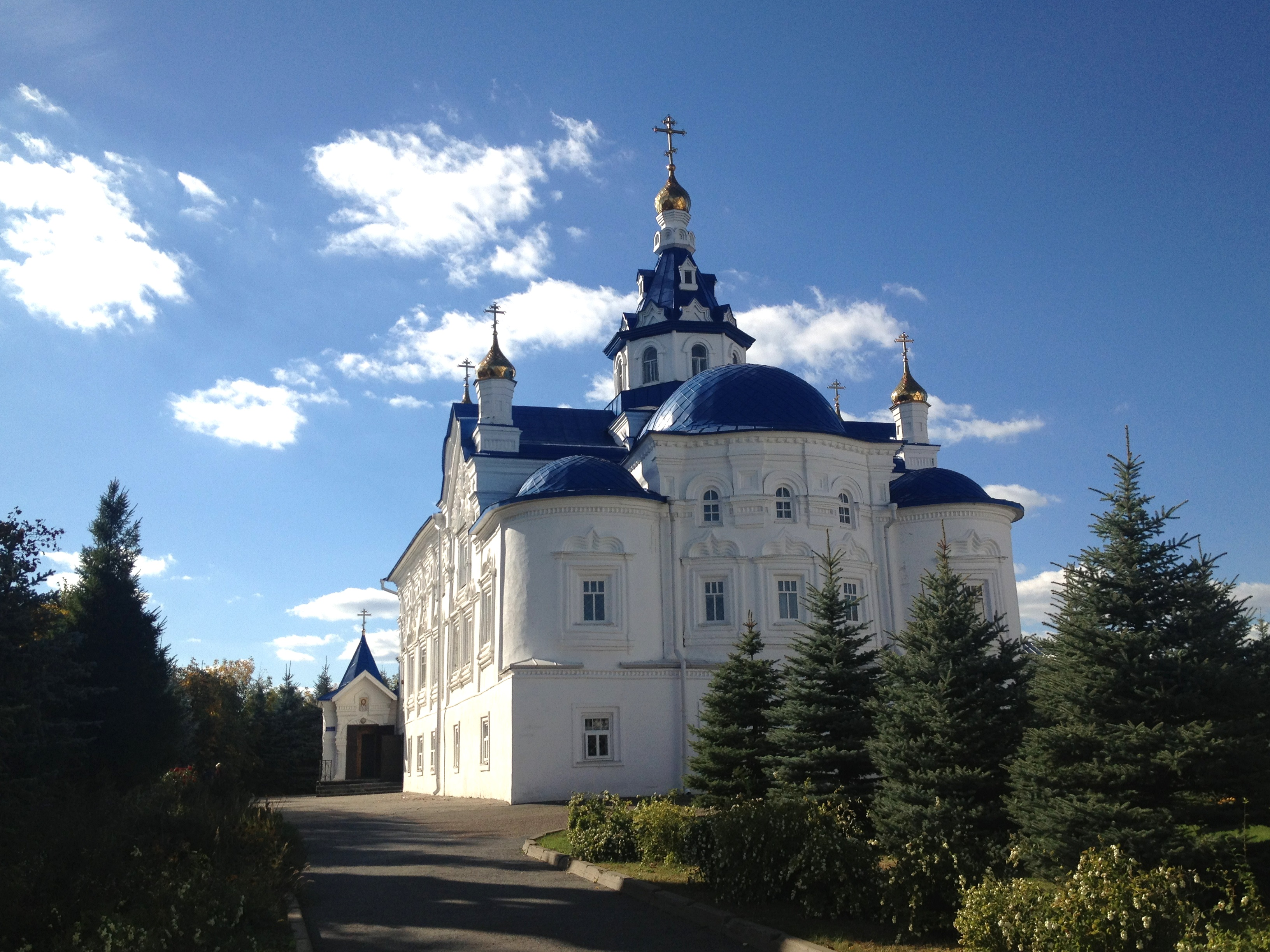 Зилантов (успенский) монастырь: сев.-зап.окраина города, Казань, Татарстан